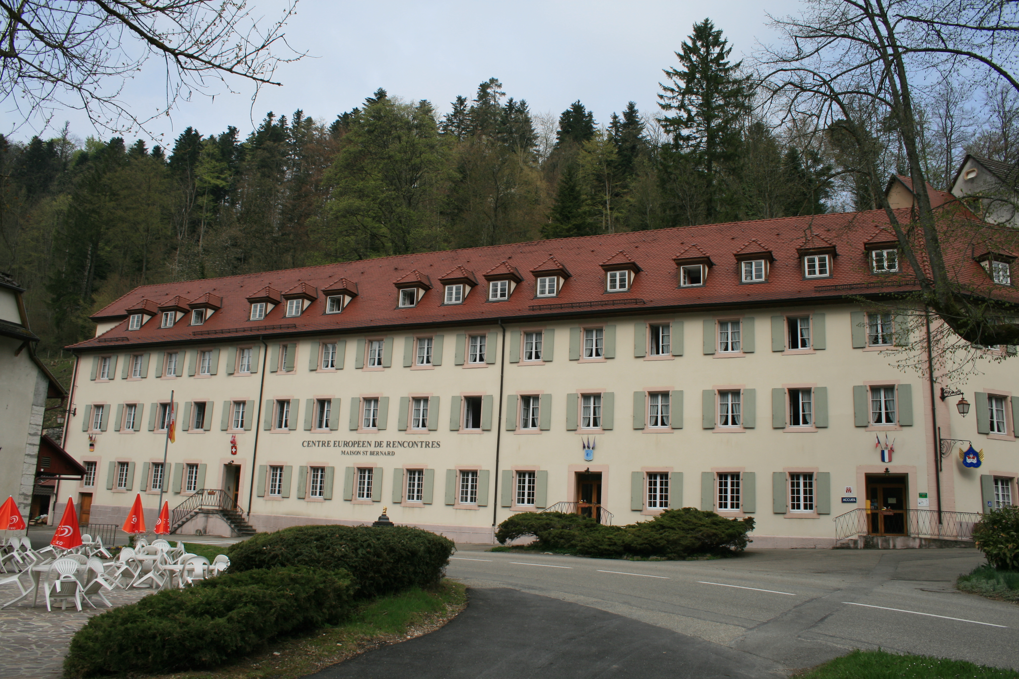 «Centre Europeen de Rencontres Lucelle» (CERL), Lucelle, Alsace